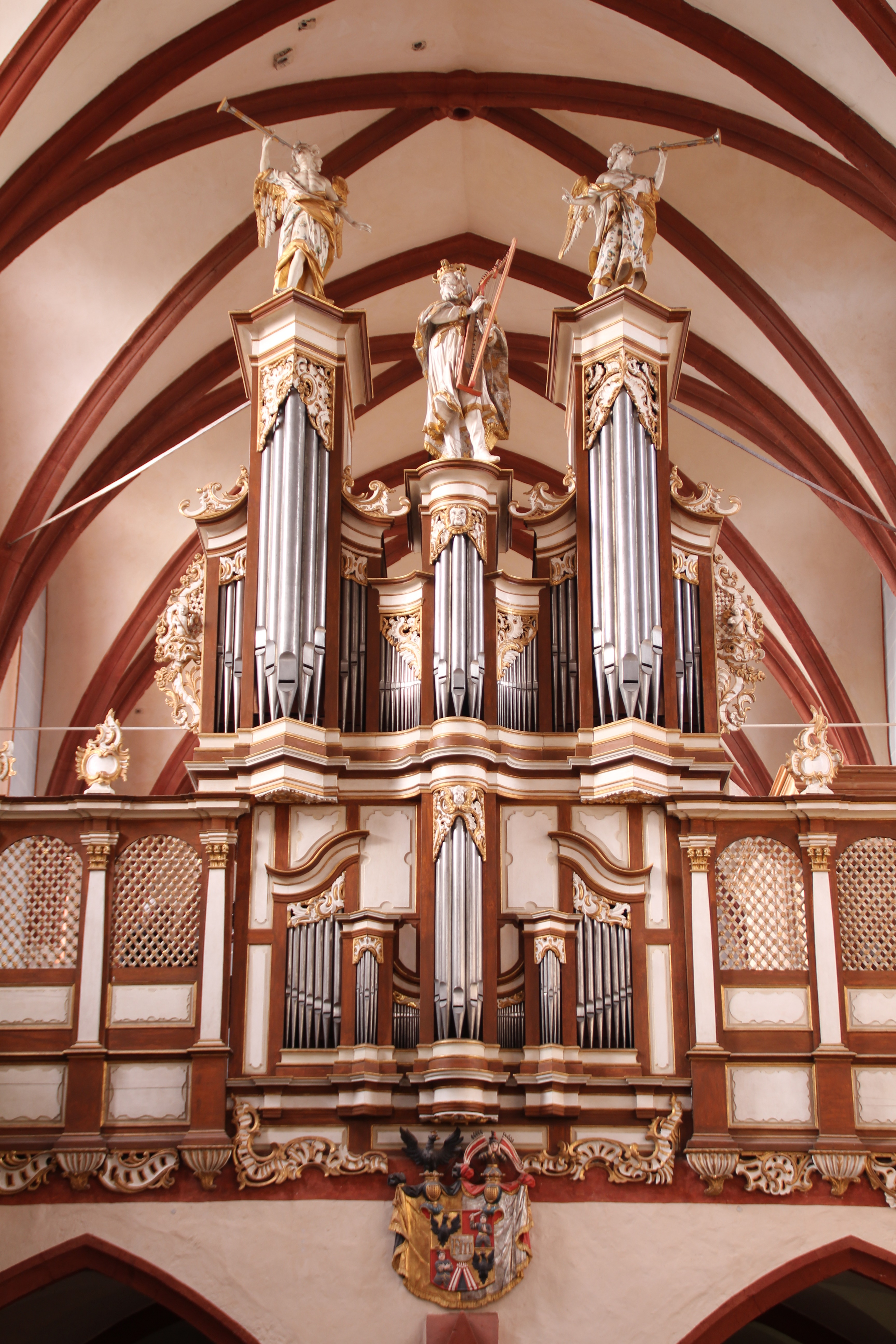 Prospekt der Schöler-Orgel in der Klosterkirche Solms-Altenberg